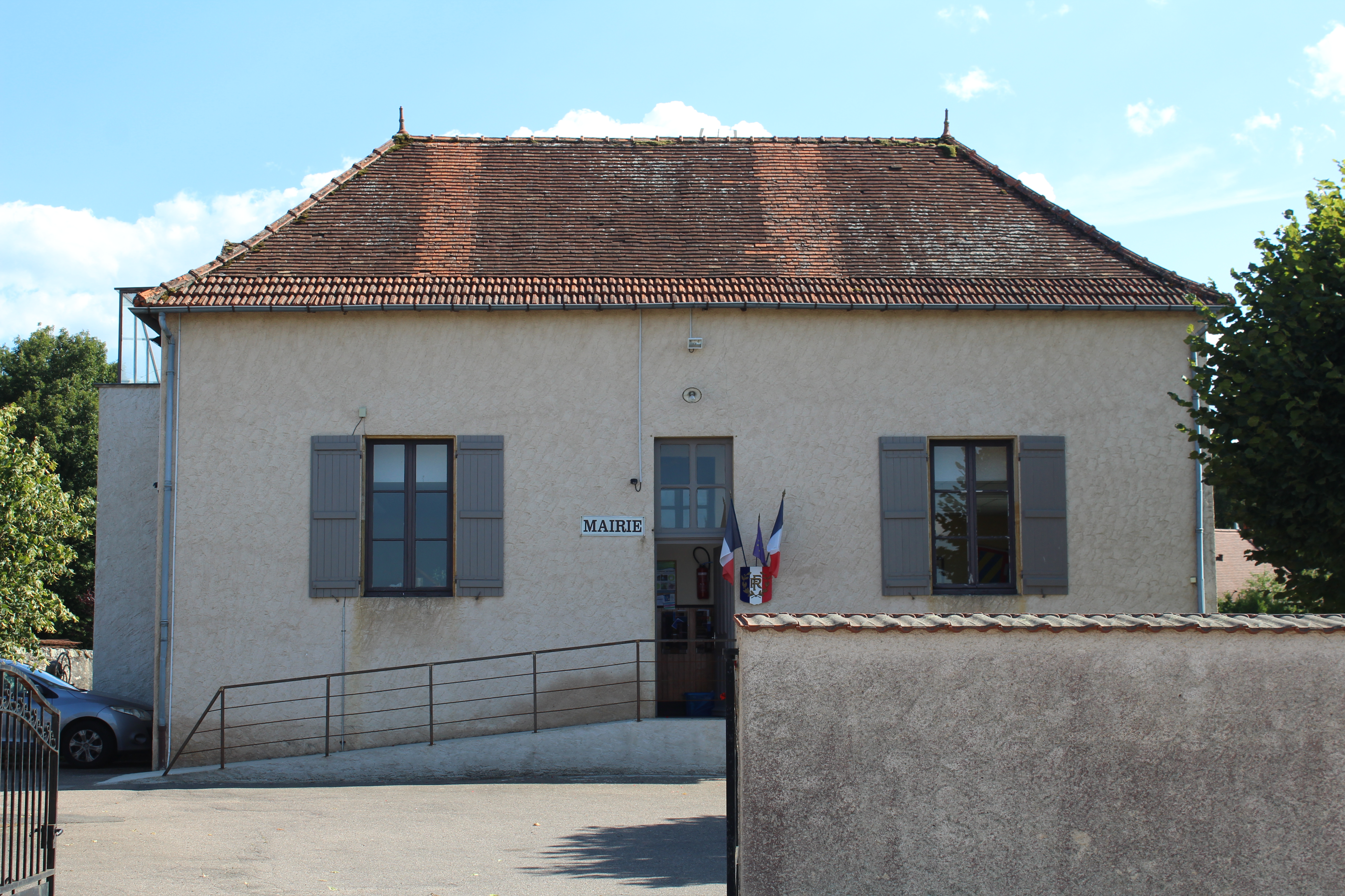 Mairie de Sainte-Foy, Saône-et-Loire.